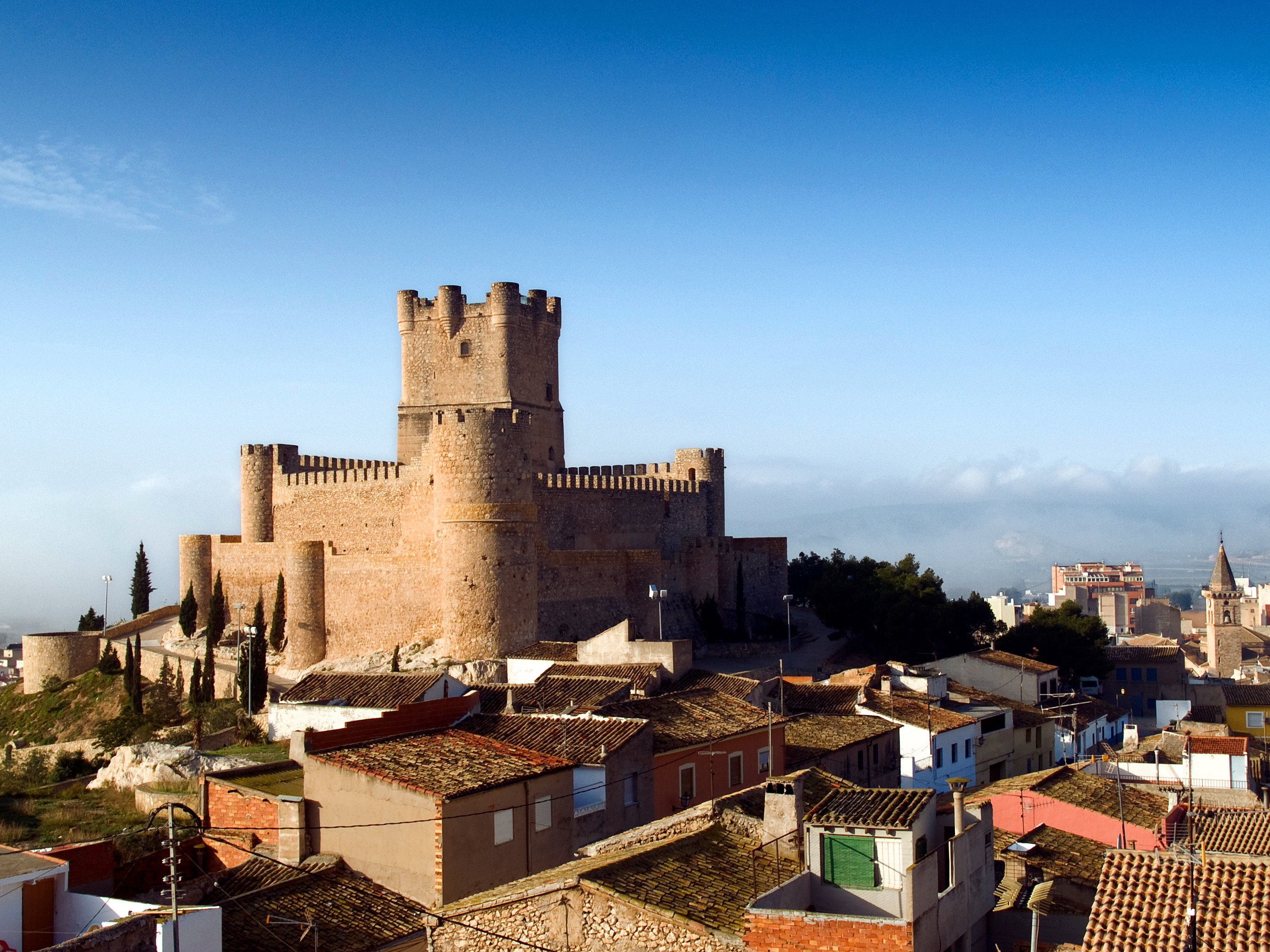 Castillo de Villena (Alicante)